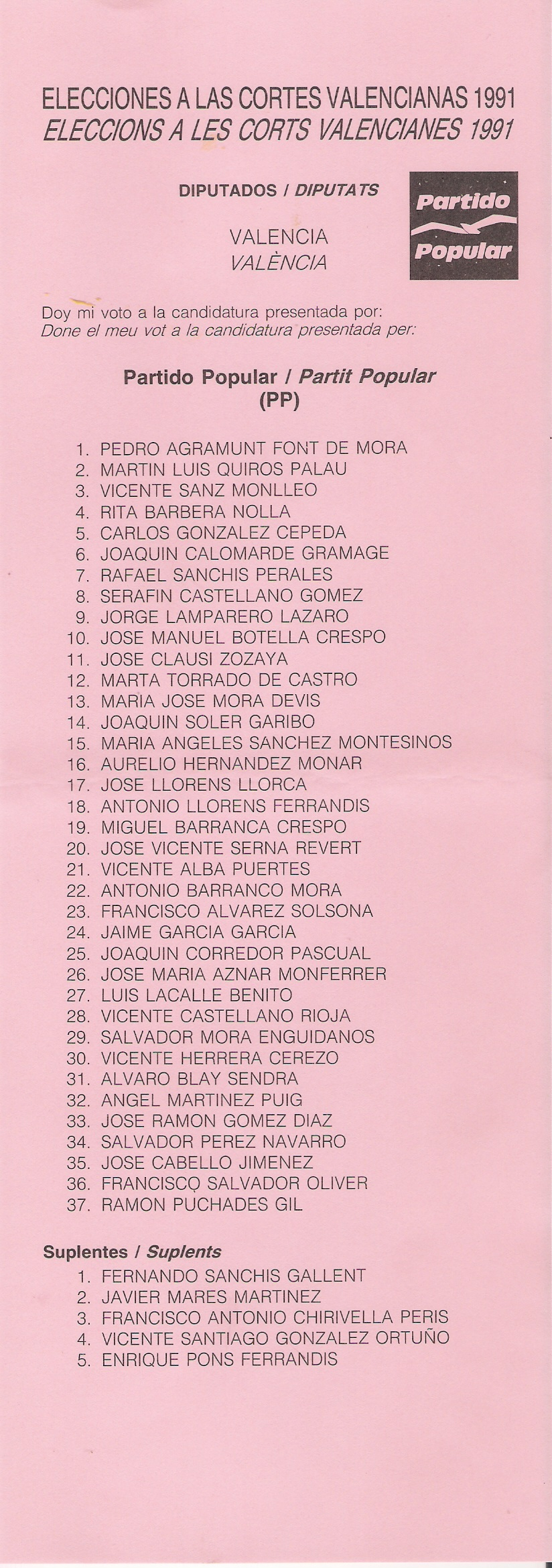 Papeleta electoral del PP por la provincia de Valencia para las Cortes Valencianas, en 1991.